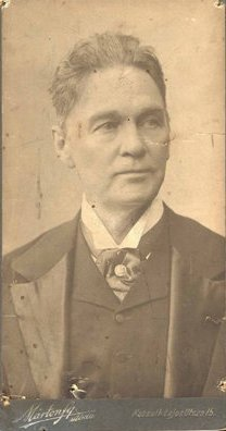 Náday Ferenc (1840-1909) kb. 60-65 éves korában.